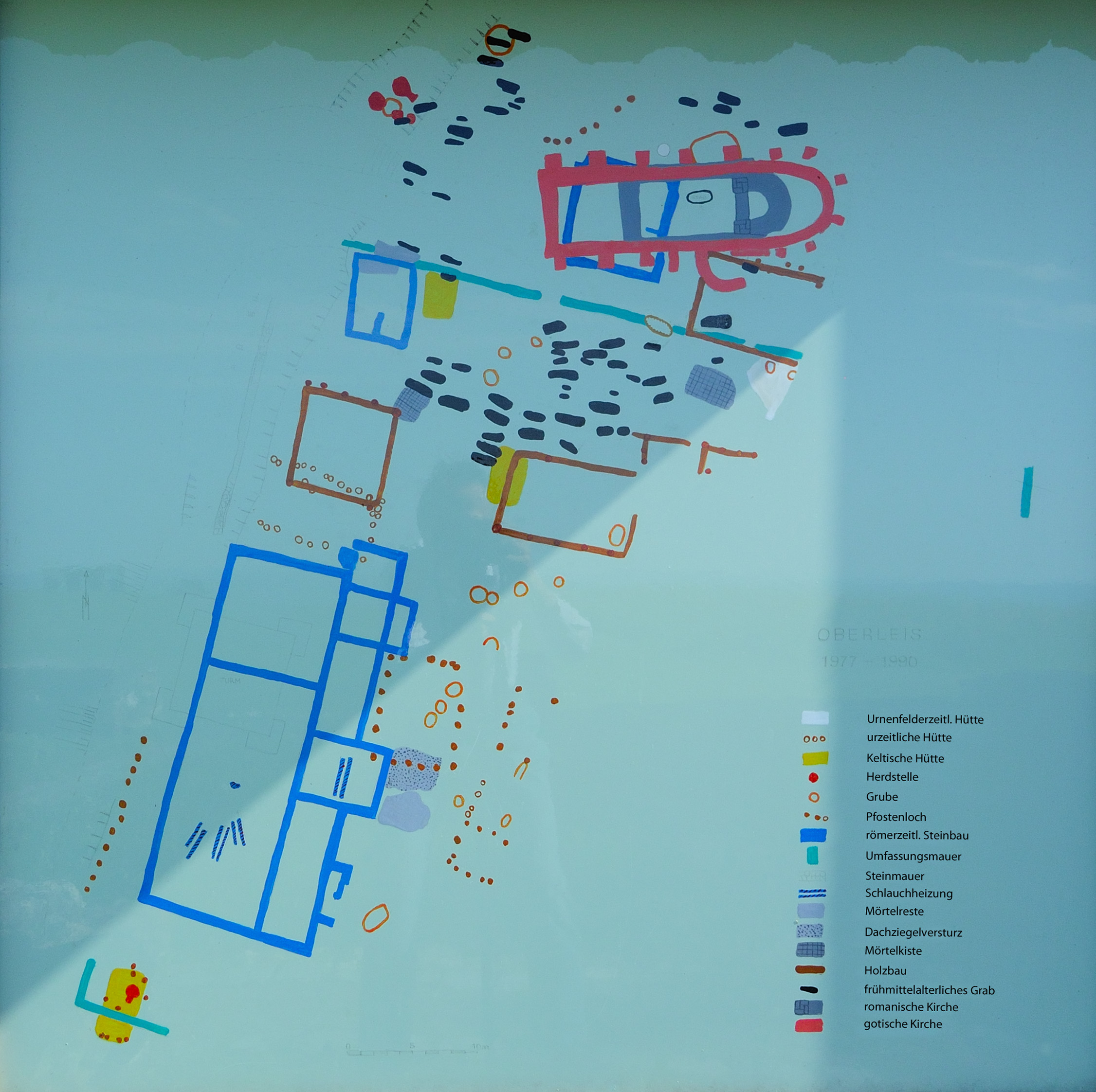 Archäologische Fundzone am Oberleiserberg in der Gemeinde Ernstbrunn, Niederösterreich, Österreich